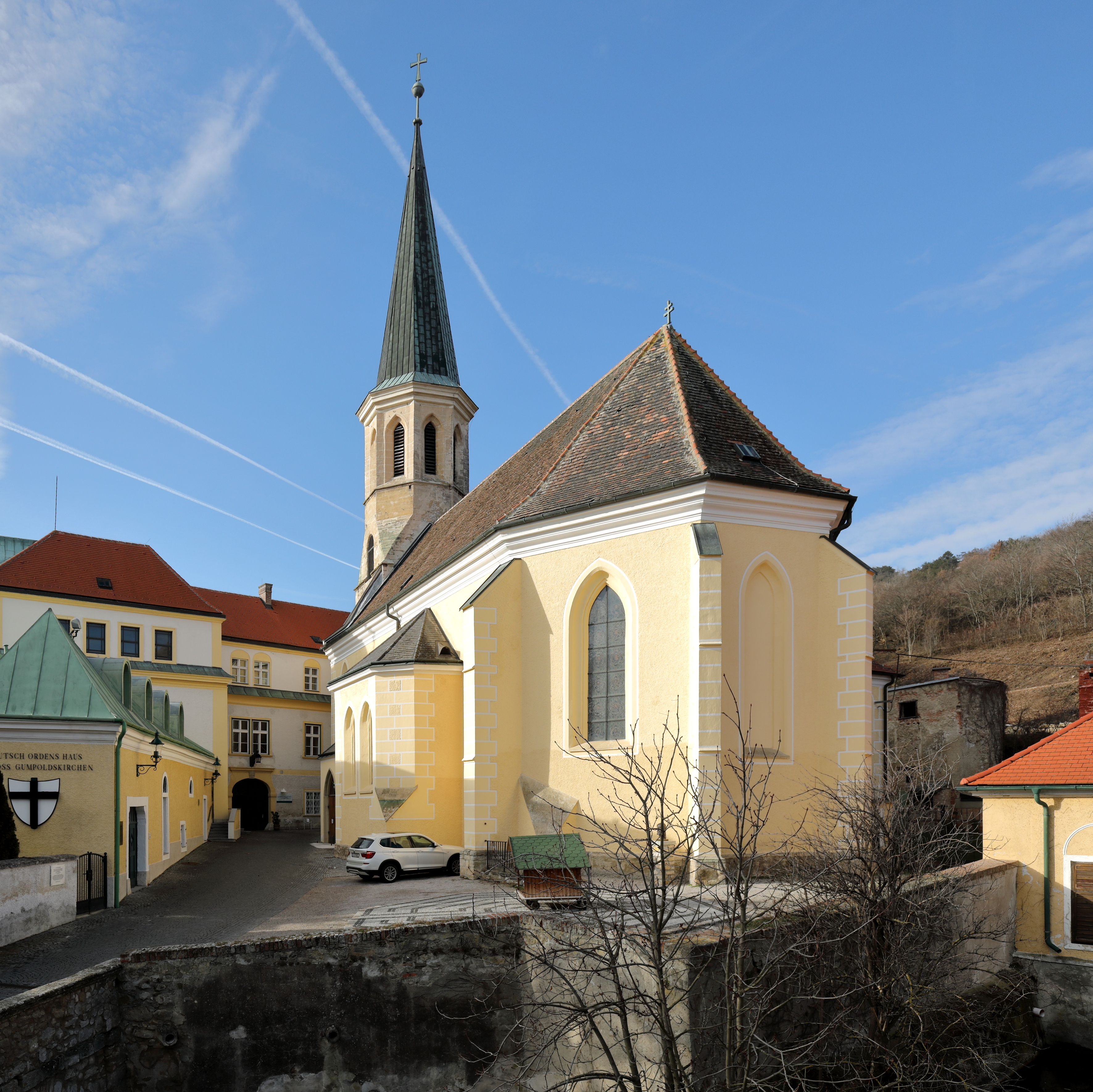 Ostansicht der röm.-kath. Pfarrkirche hl. Michael in der niederösterreichischen Marktgemeinde Gumpoldskirchen. Ein gotischer Hallenbau aus dem Ende des 14. Jahrhunderts mit einem vorgestelltem Westturm. Ursprünglich war sie eine Burgkirche, die teilweise von einem Wassergraben und wehrhafter Kirchhofmauer umgeben ist.